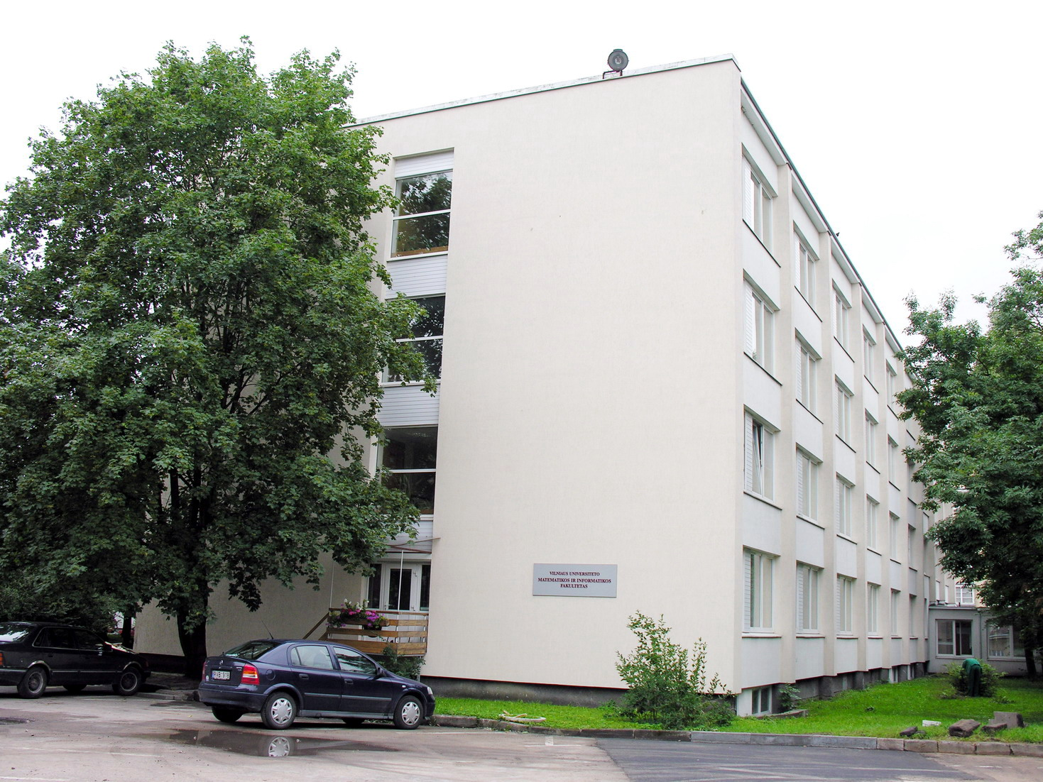 Vilniaus universitetas Matematikos ir informatikos fakultetas Foto: Algirdas, 2006 m. rugpjūčio 8 d., Lietuva